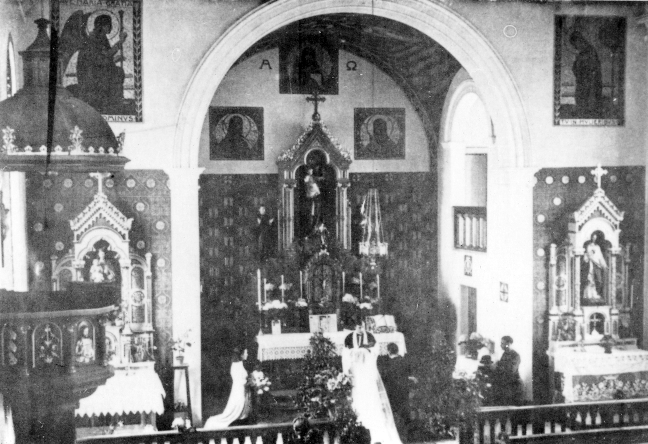 Römisch-katholische Pfarrkirche St. Pirminius Pfungen, Innenansicht alte Ausstattung zwischen 1907 und 1961